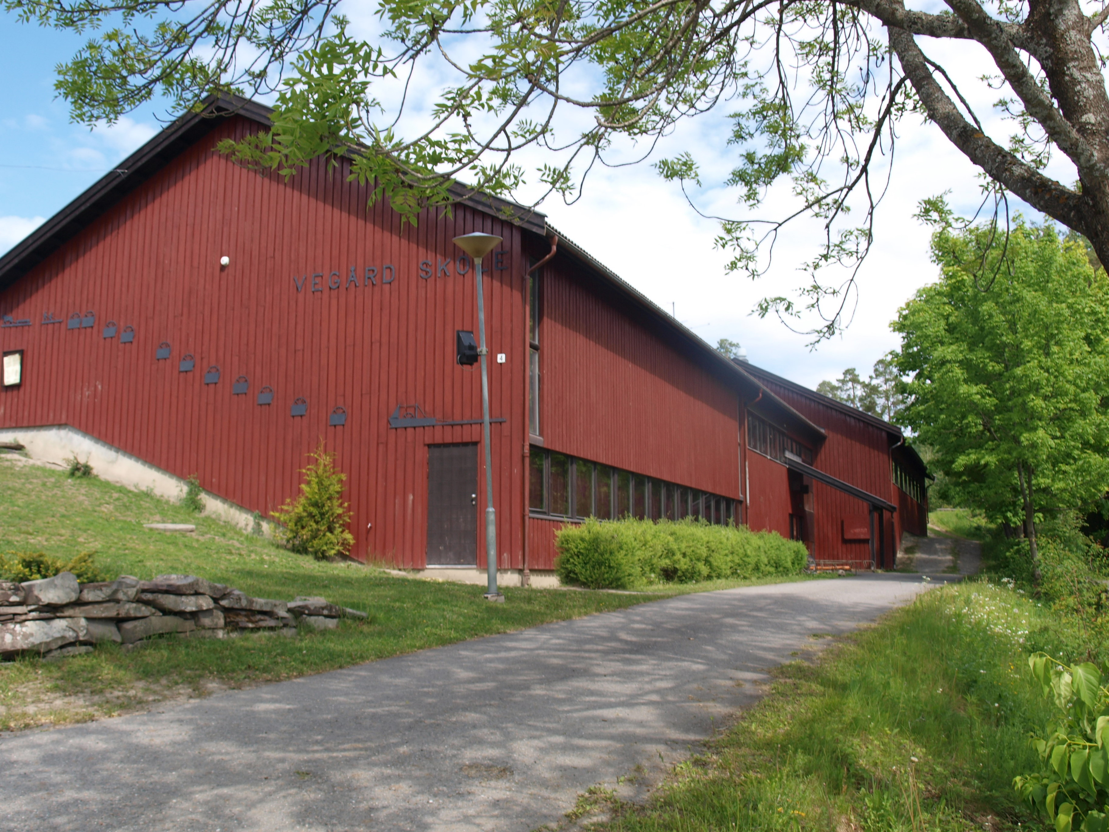 Vegård skole, som ligger i Åsa i Ringerike kommune i Buskerud.